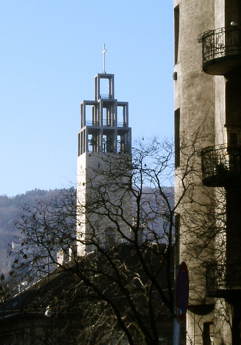 Clocher de la paroisse de Városmajori, en Hongrie, par Bertalan Árkay.